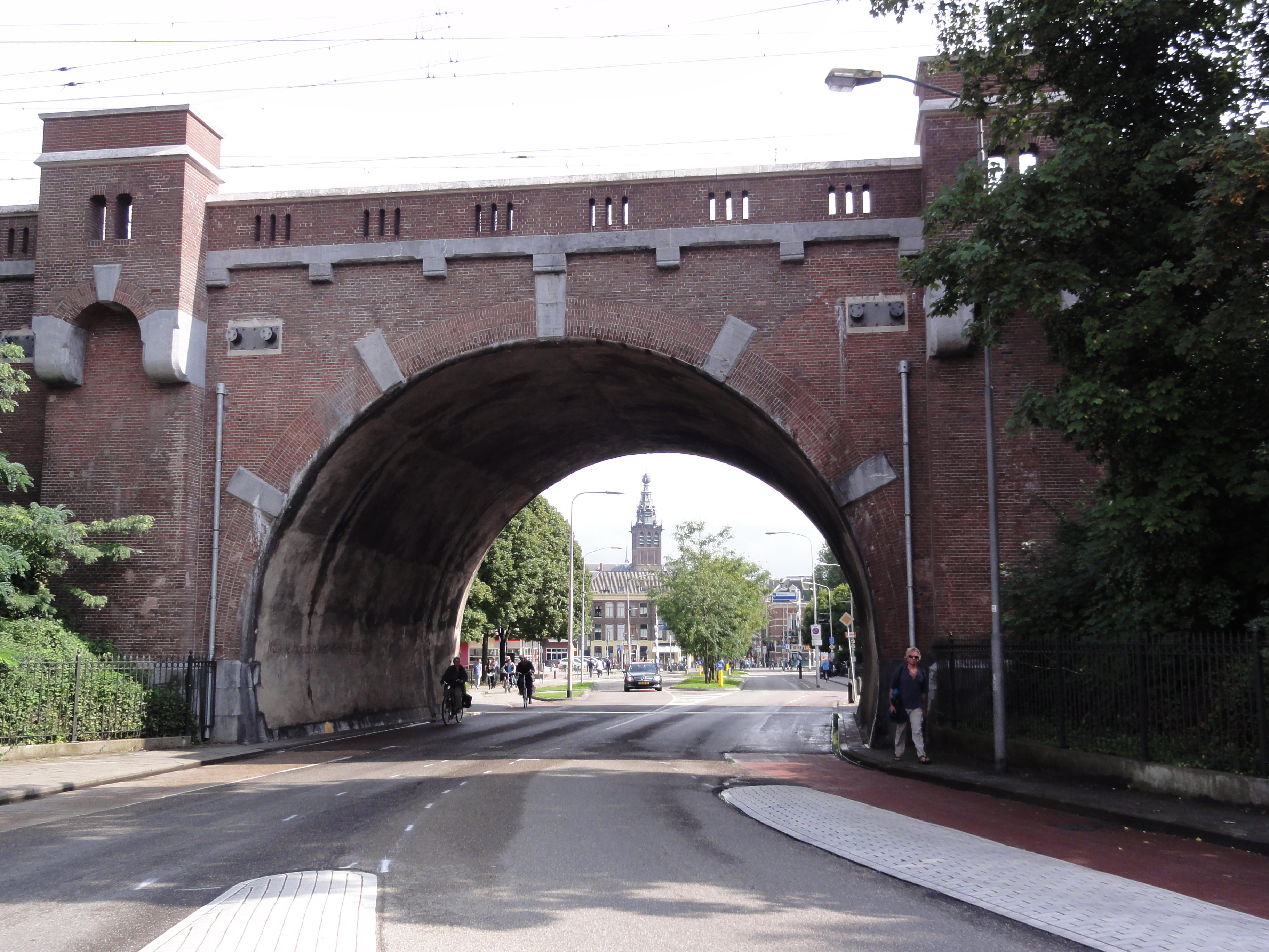 Nijmegen Rijksmonument523064 Hezelpoort